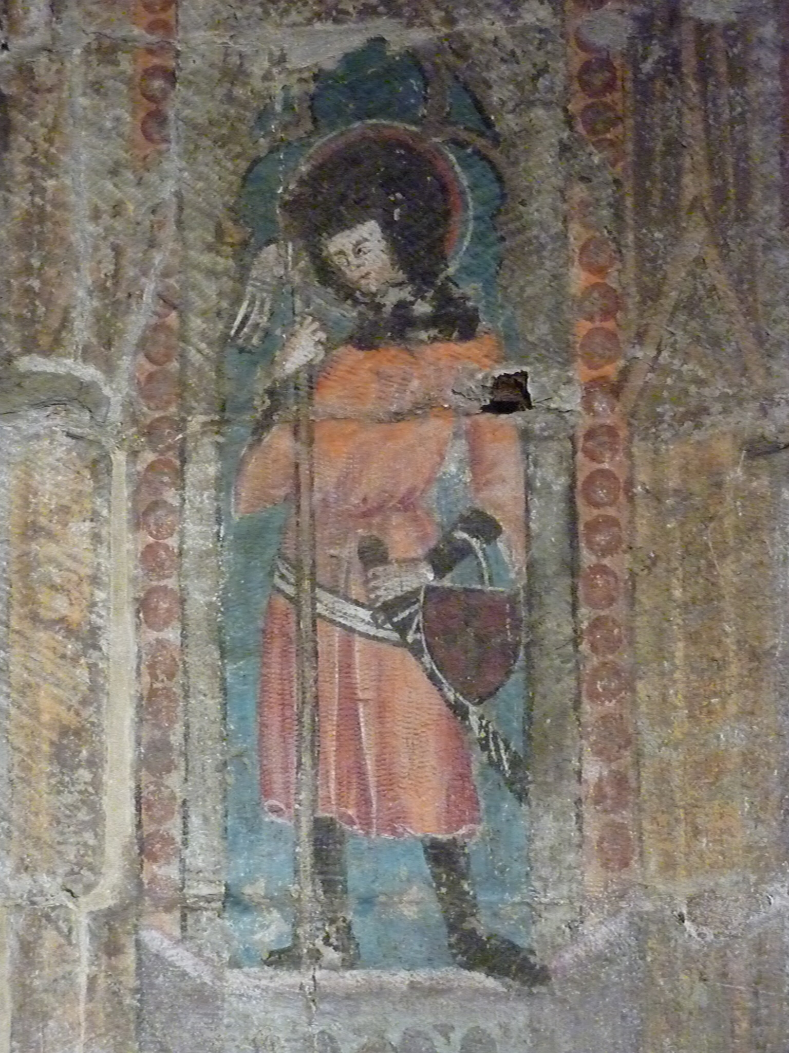 Cathédrale St-Nicolas de Fribourg (Suisse). Peinture découverte en 2011.